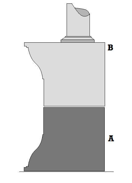 Ricostruzione del podio del Tempio sannita dedicato alla dea Flora in Cerreto Sannita (Bn): A) parte esistente; B) ricostruzione della parte superiore.